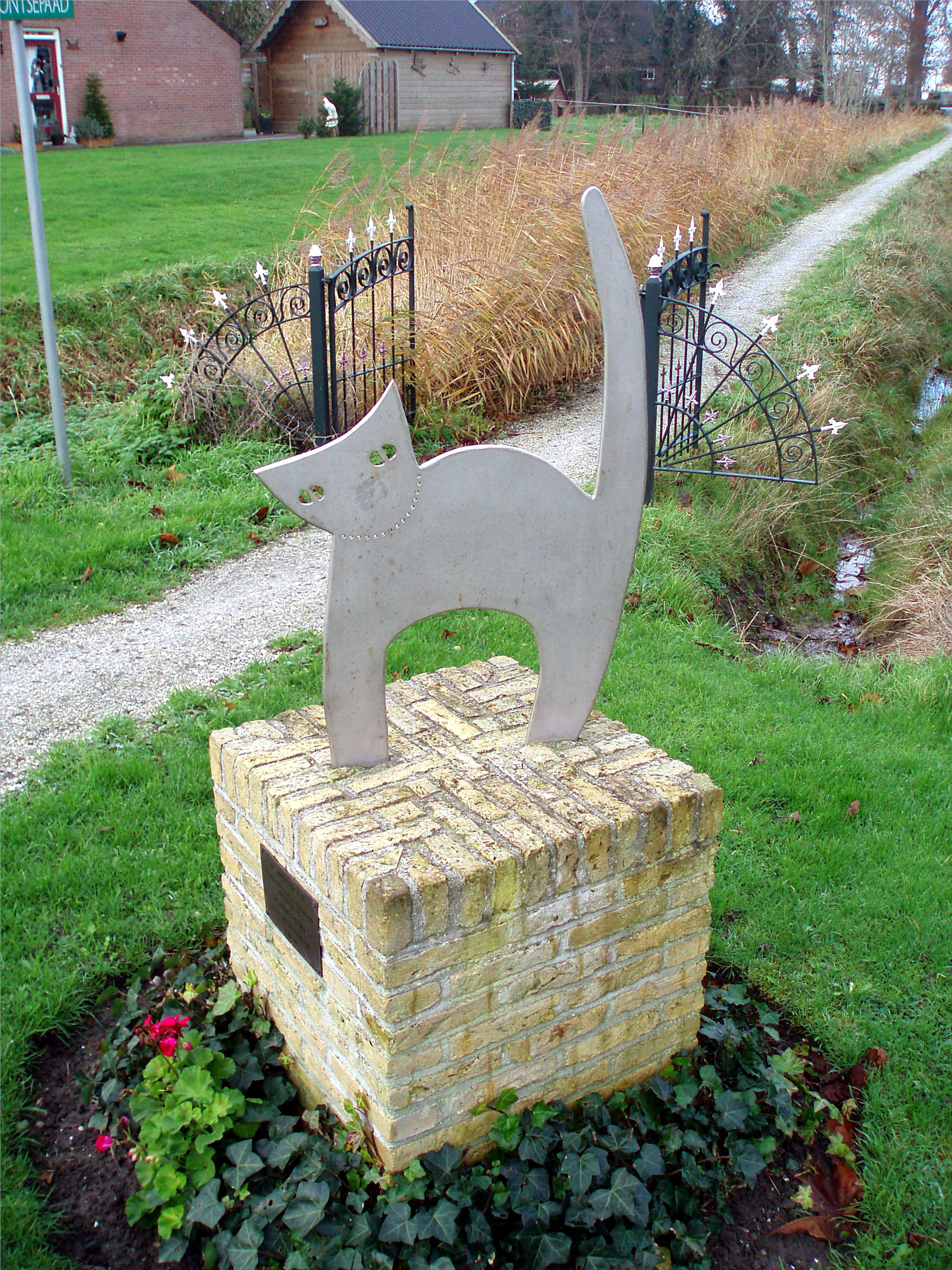 Bram-Jan Visser, 2002